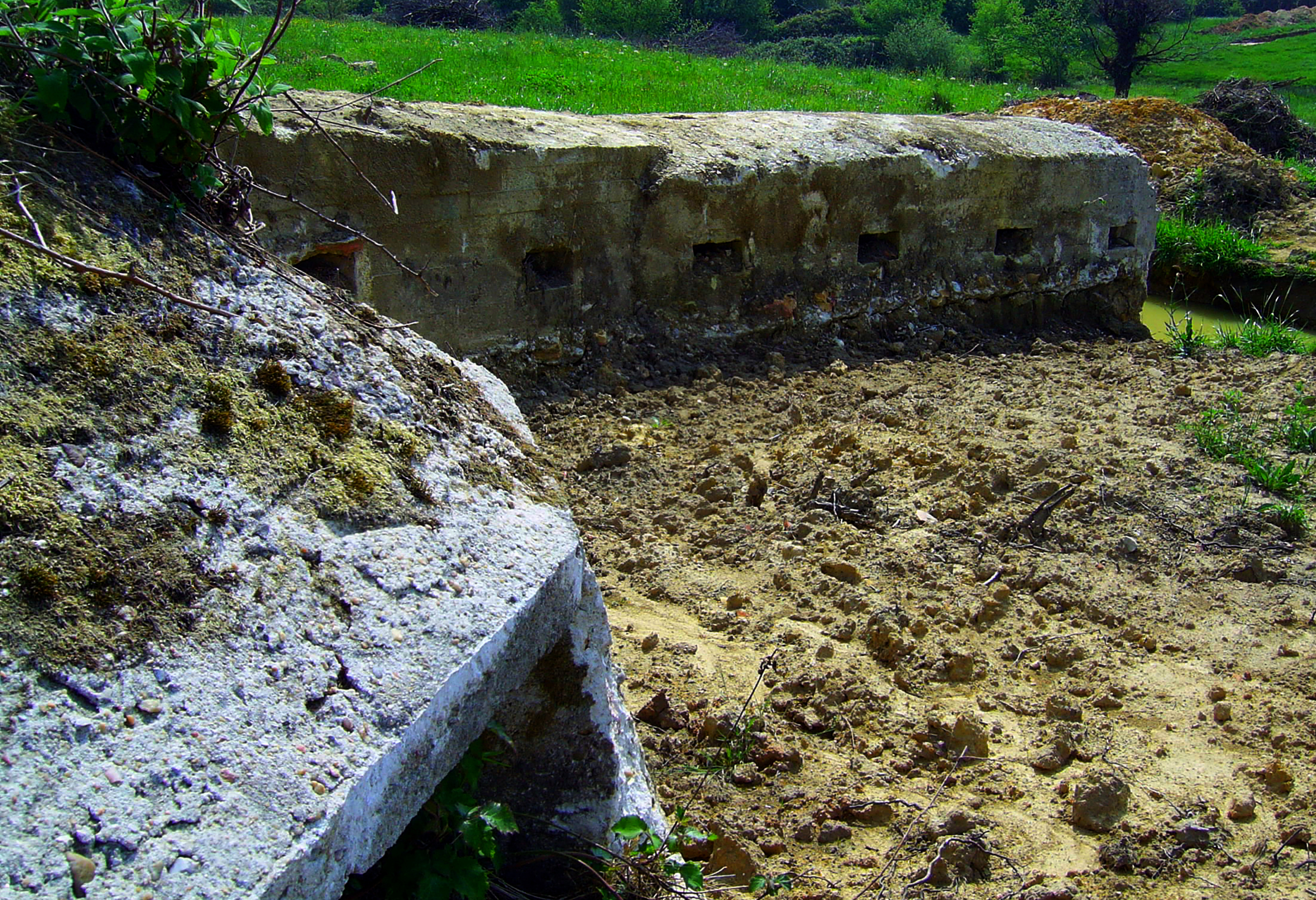 Arquitectura militar de la guerra civil española. Conjunto fortificado de Matalablima. Oviedo, Asturias